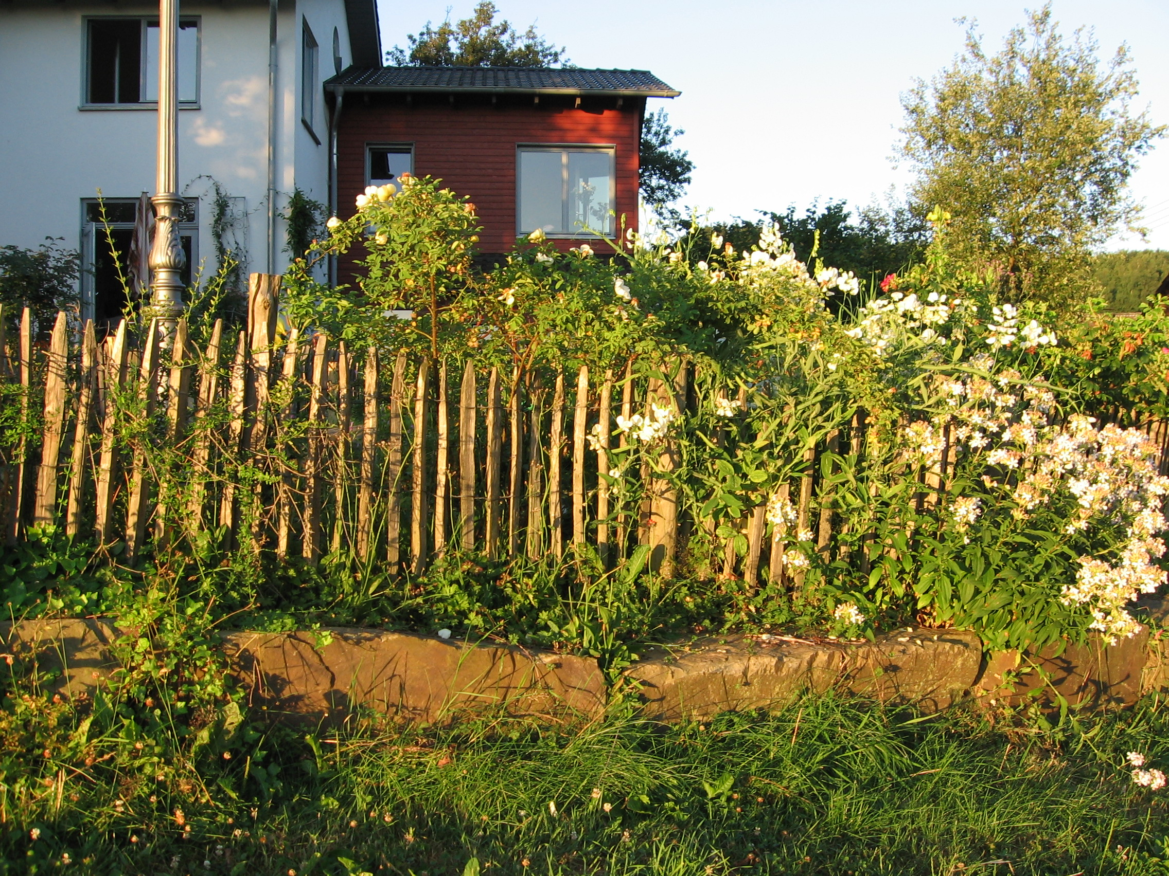 Staketenzaun als Vorgartenzaun Höhe 80 cm